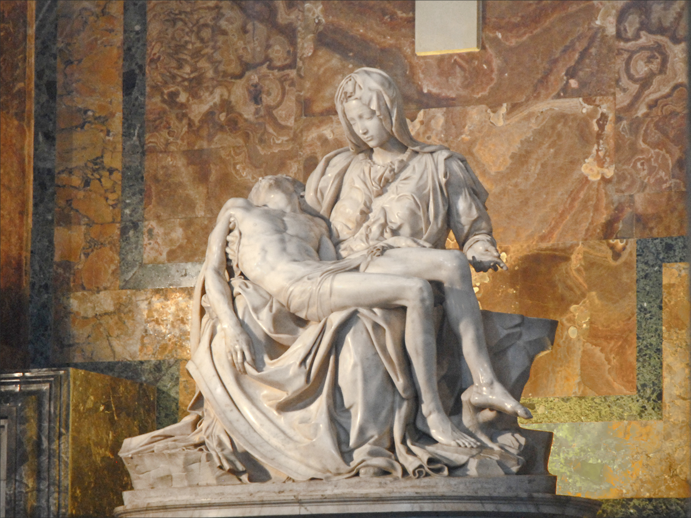 La Pietà de Michel-Ange est exposée dans la basilique Saint-Pierre Sculpté par Michel-Ange en 1499-1500, ce groupe était destiné au tombeau du Cardinal Jean de Bilhères, abbé de Saint-Denis. C'est un des chefs-d'oeuvre de l'artiste. Site du Vatican